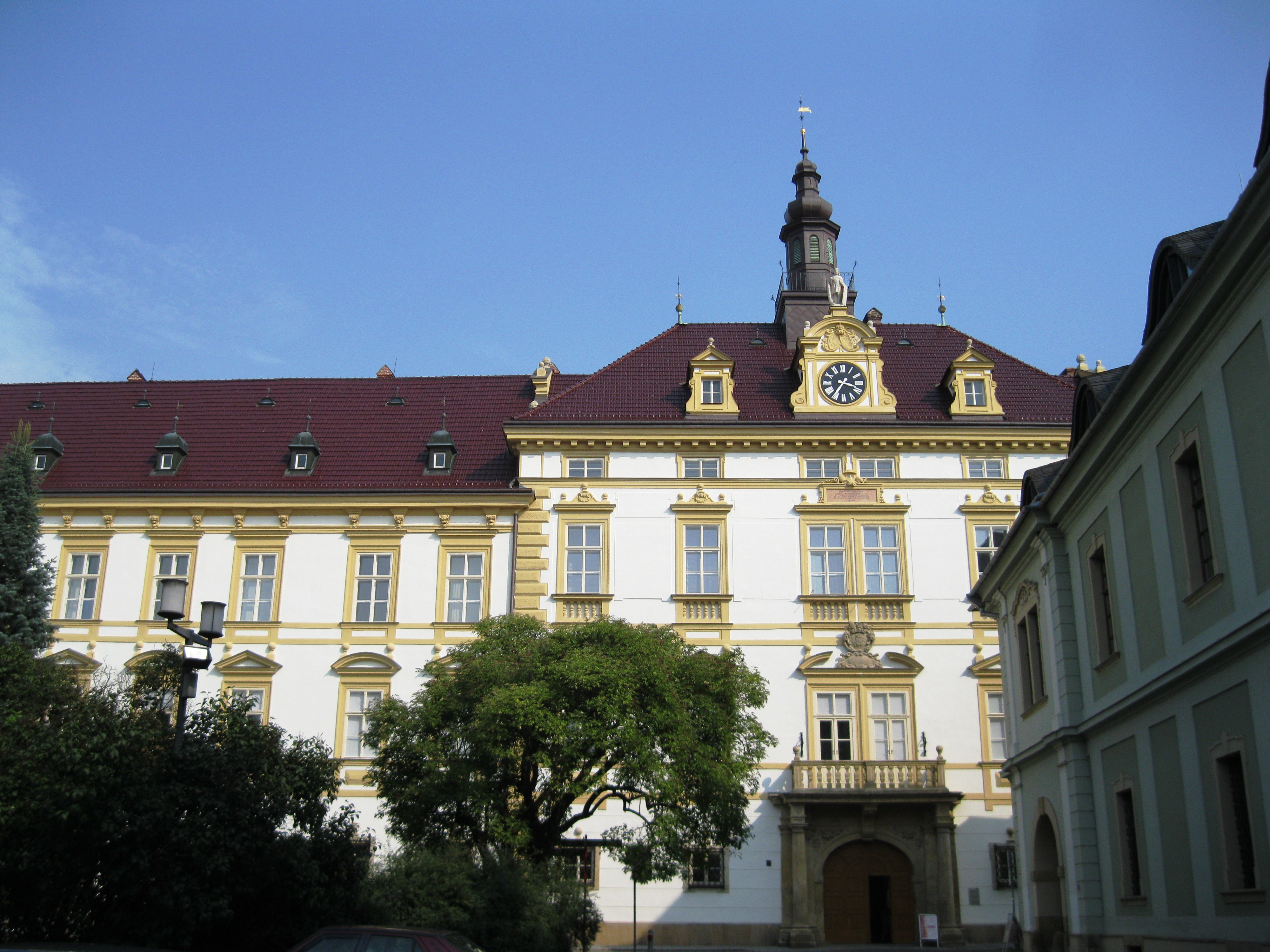 Arcibiskupství - arcibiskupský palác (Olomouc)